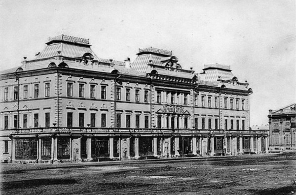 г. Иркутск. Ивановская площадь Здание судебных установлений 1891г.